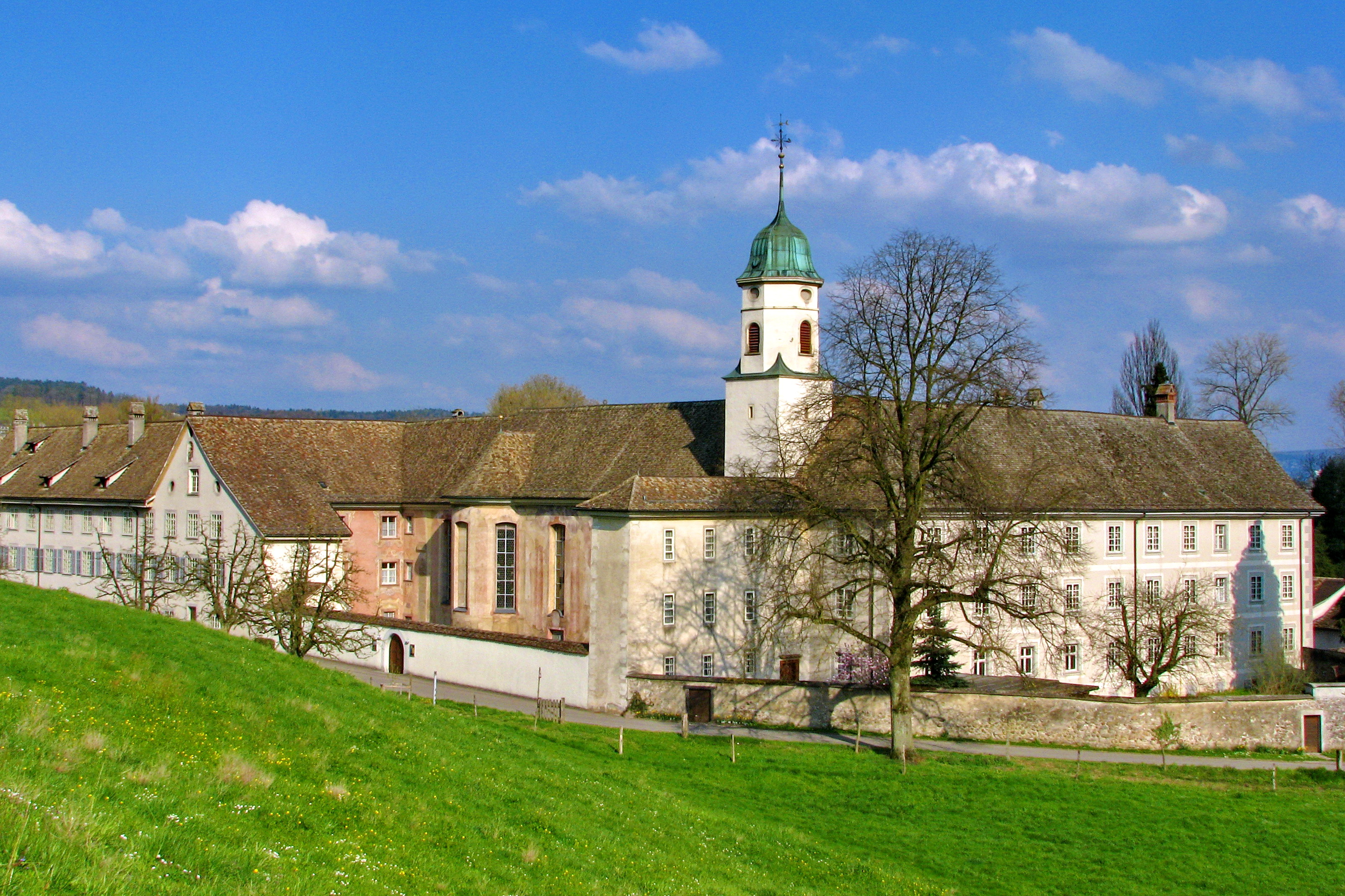 Kloster Fahr in Würenlos, Unterengstringen to the left, Limmattal in the background.